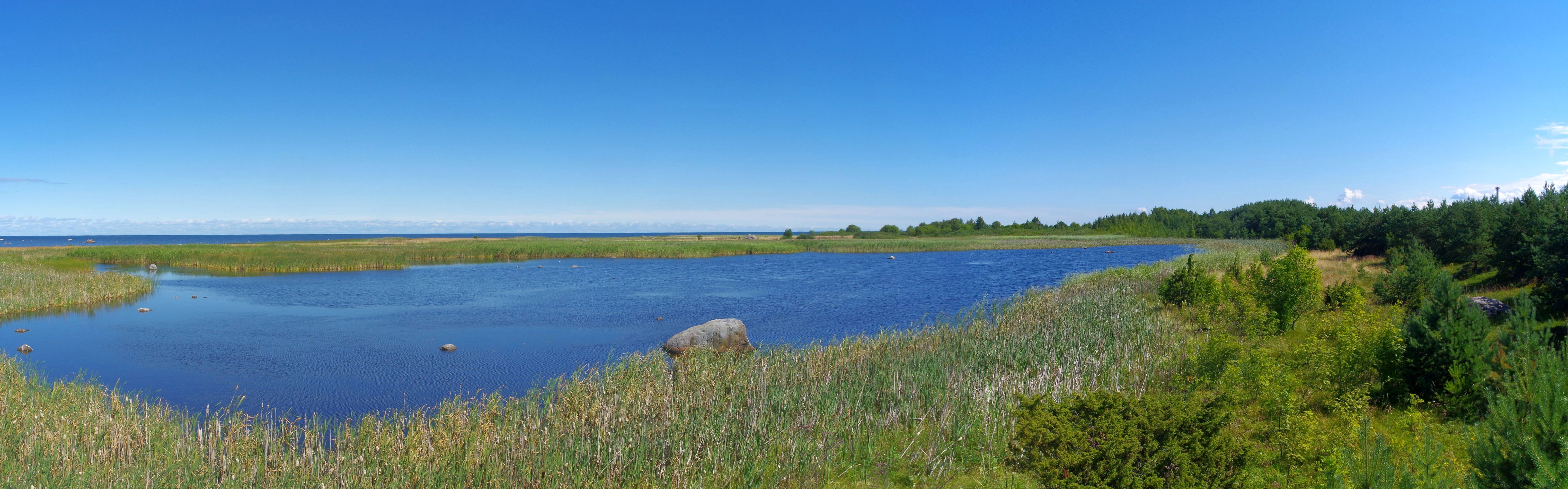 Rammu saar on Harjumaal Jõelähtme vallas asuv 1,0256 km² suurune väikesaar.